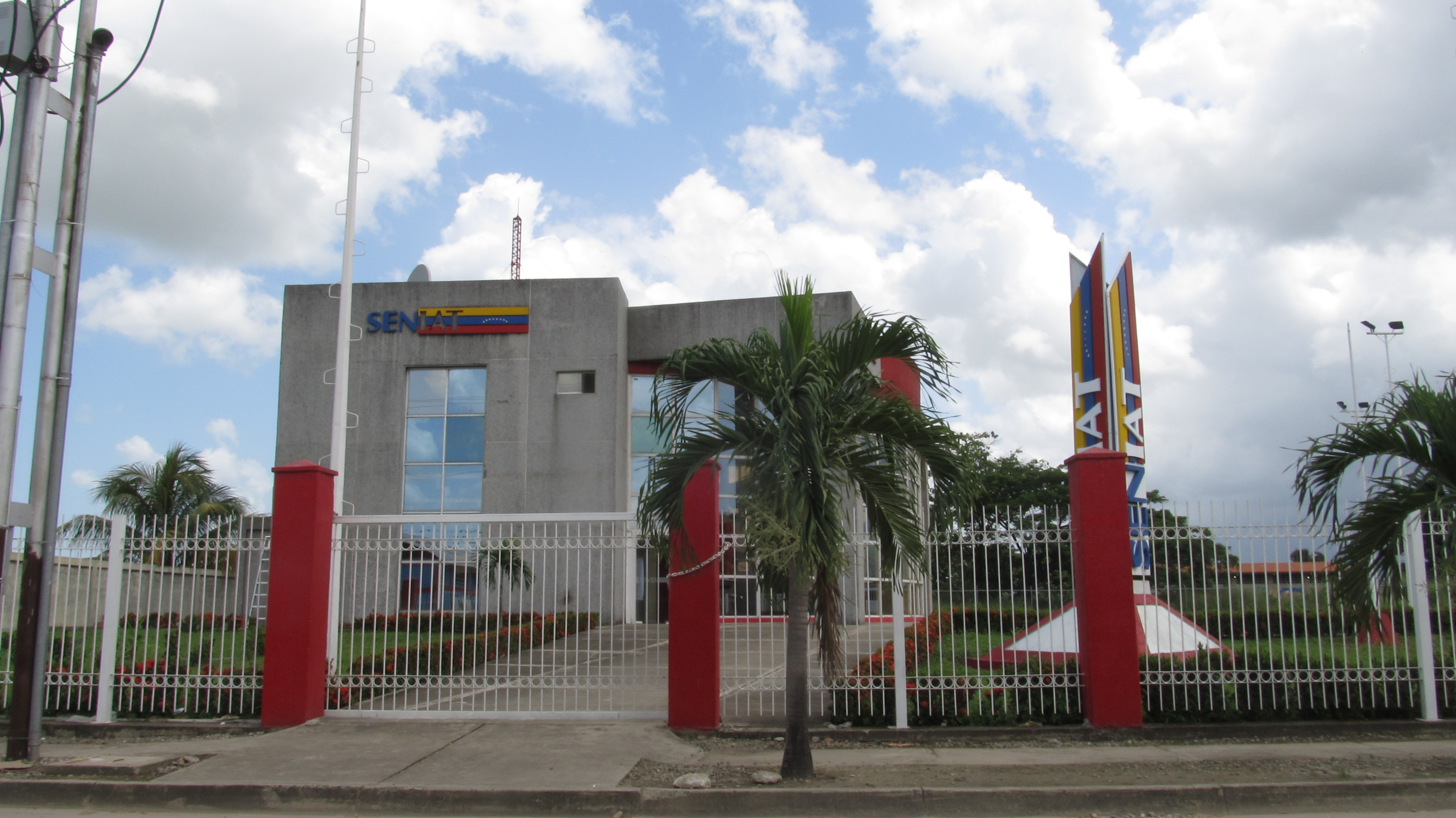 Oficina del SENIAT de la localidad de Socopó (estado Barinas), Venezuela